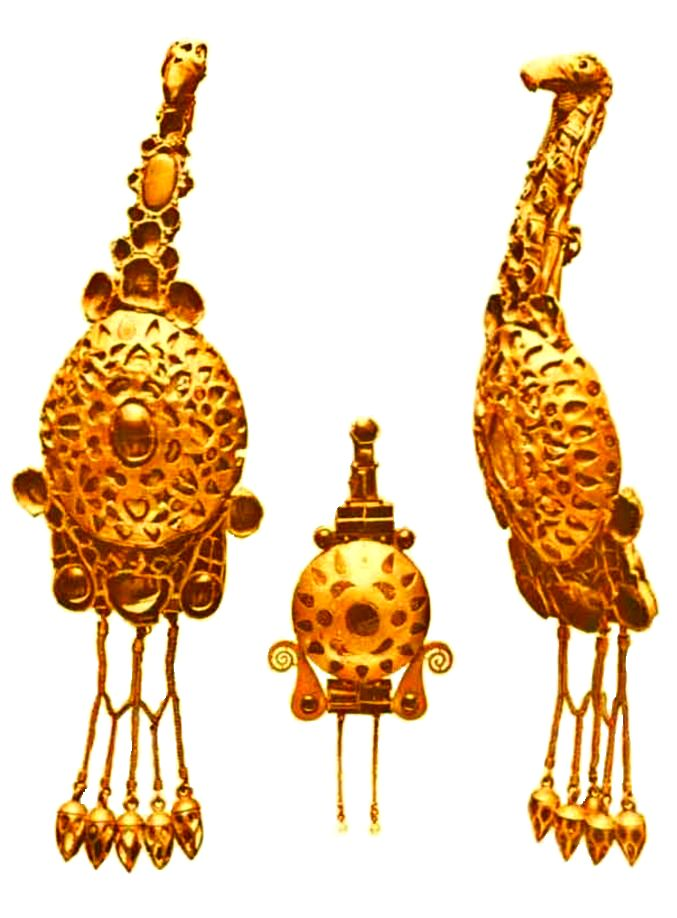 Fibulele mijlocii și fibula mică de la Pitroasele